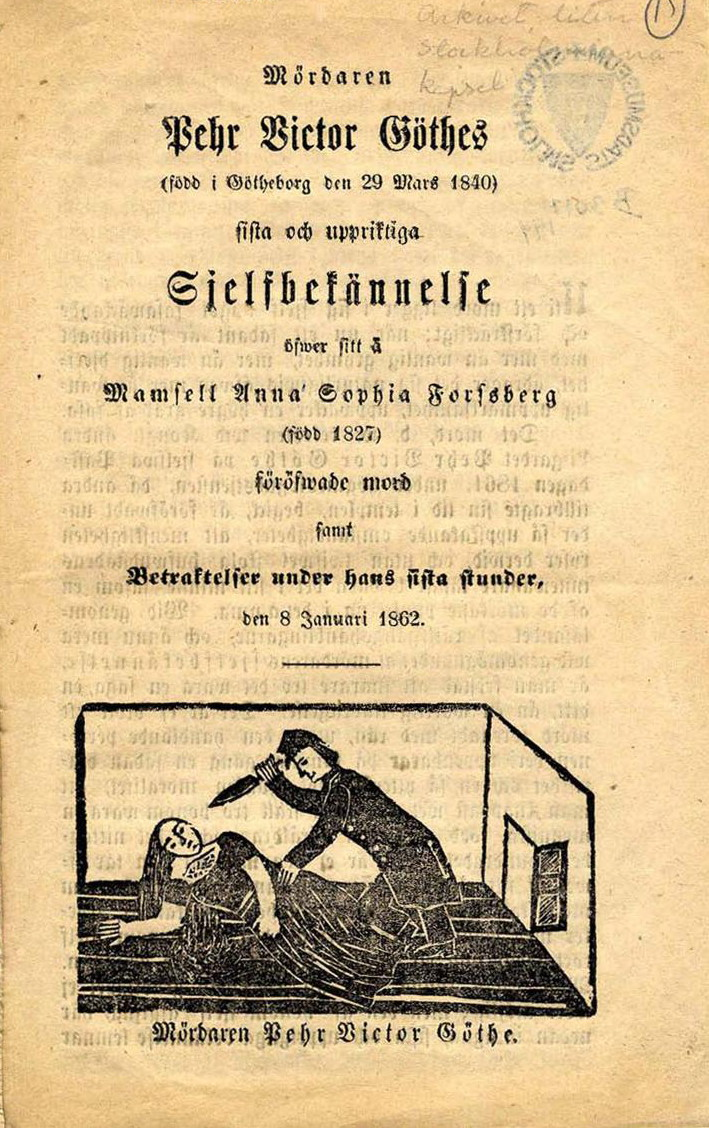 Skillingtryck om den hemska händelsen och en Sista och uppriktiga Sjelvbekännelse av mördaren, Pehr Victor Göthe.